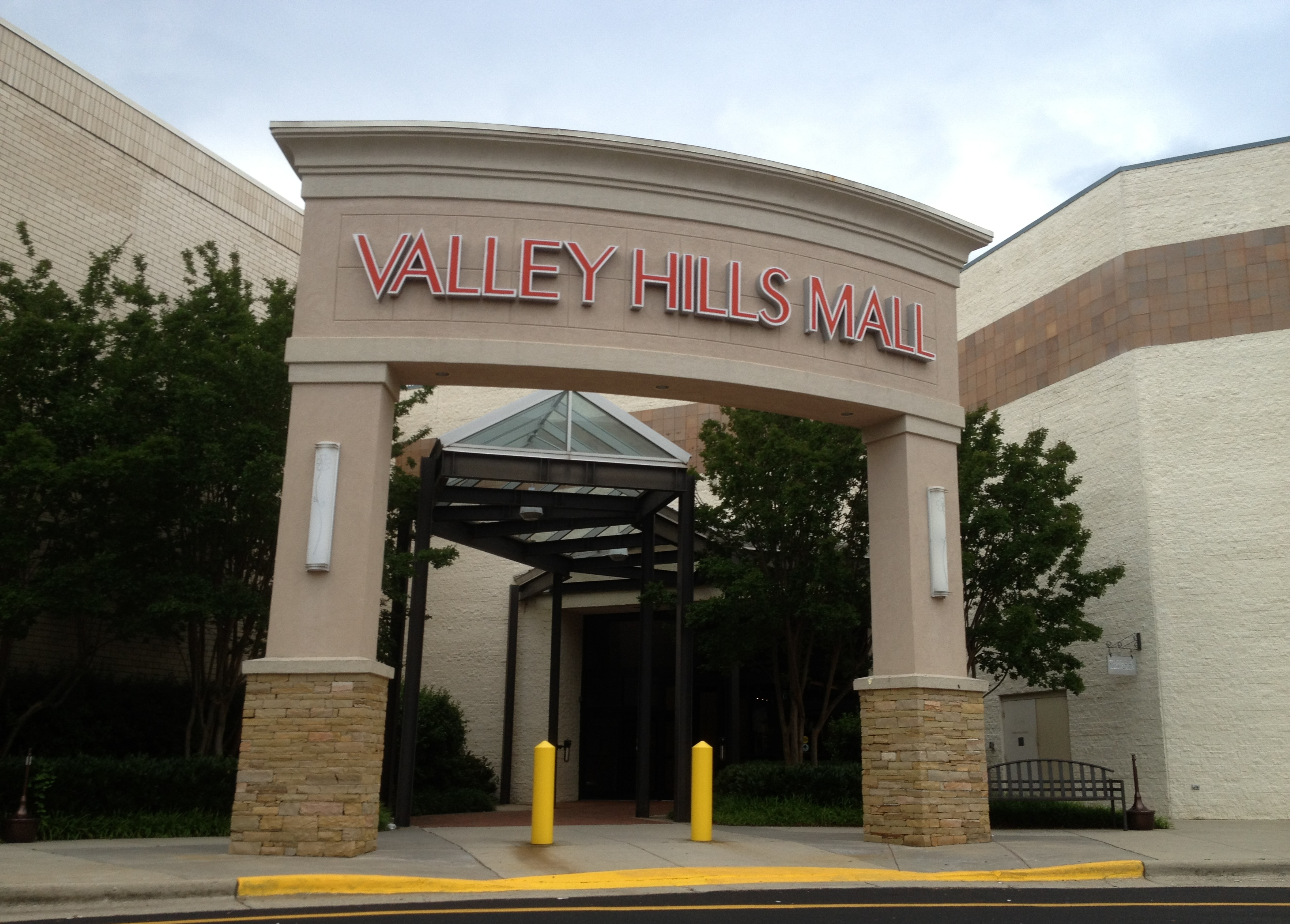 Valley Hills Mall